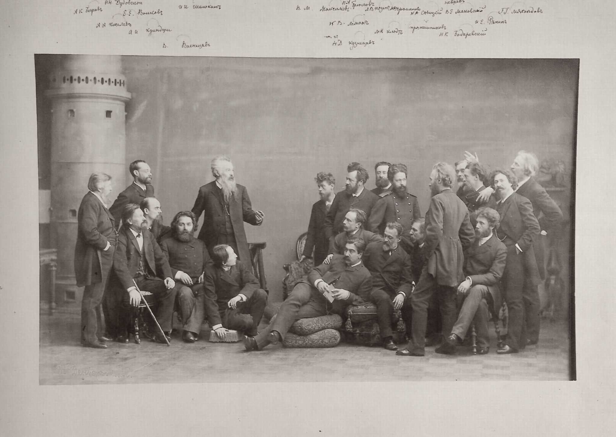 Denier, Andrej I.: Gruppe russischer Maler. St. Petersburg